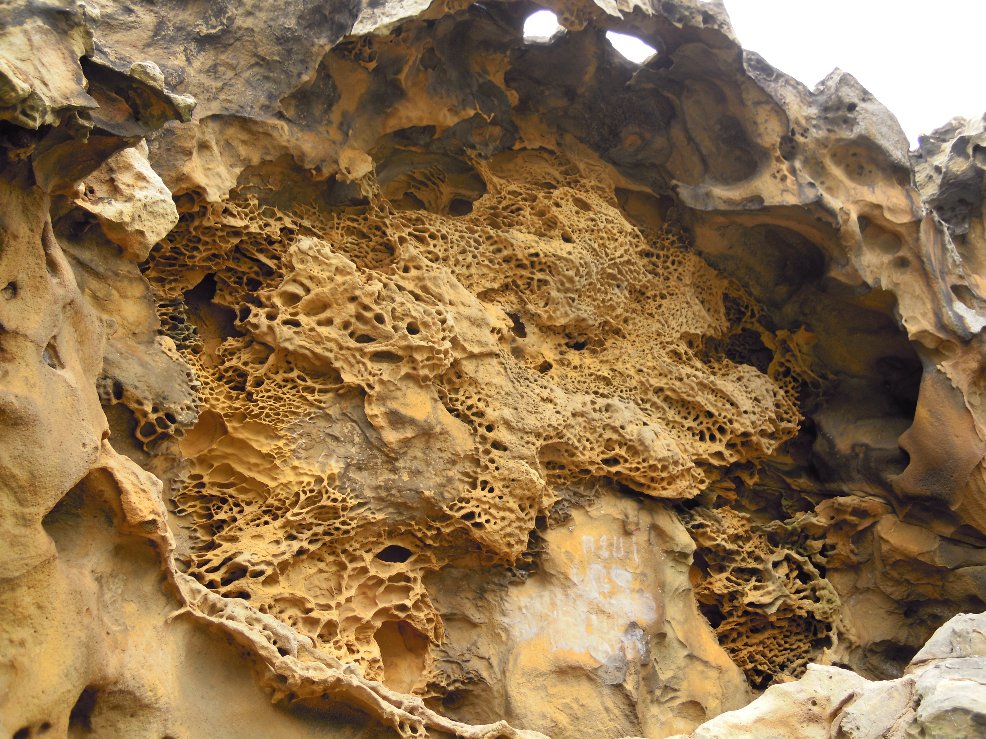 Acantilados de Jaizkibel, formación producida por la erosión sobre la roca caliza This is a photography of a Site of Community Importance in Spain with the ID: ES2120017. Natura2000 entry, EEA entry